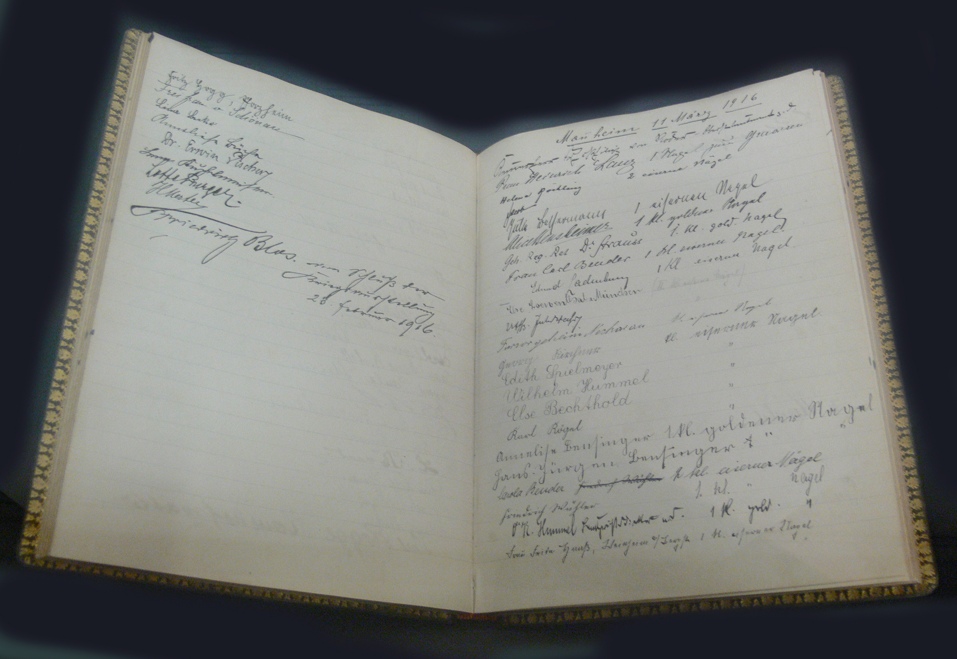 Nagelbuch, Mannheim 1916 (Einträge von Spendern einer Nagelfigur-Aktion im Ballhaus im Mannheimer Schlossgarten, bei der ein Holzkreuz genagelt wurde) Collection: Stadtarchiv Mannheim, on display at Reiss-Engelhorn-Museen, Mannheim